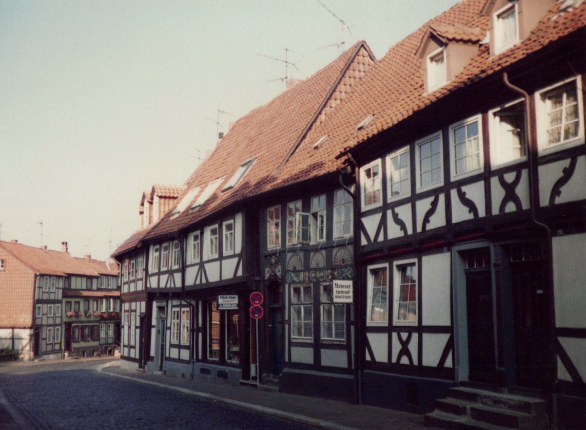 Straße "Gelber Stern" mit dem Waffenschmiedehaus (1548).